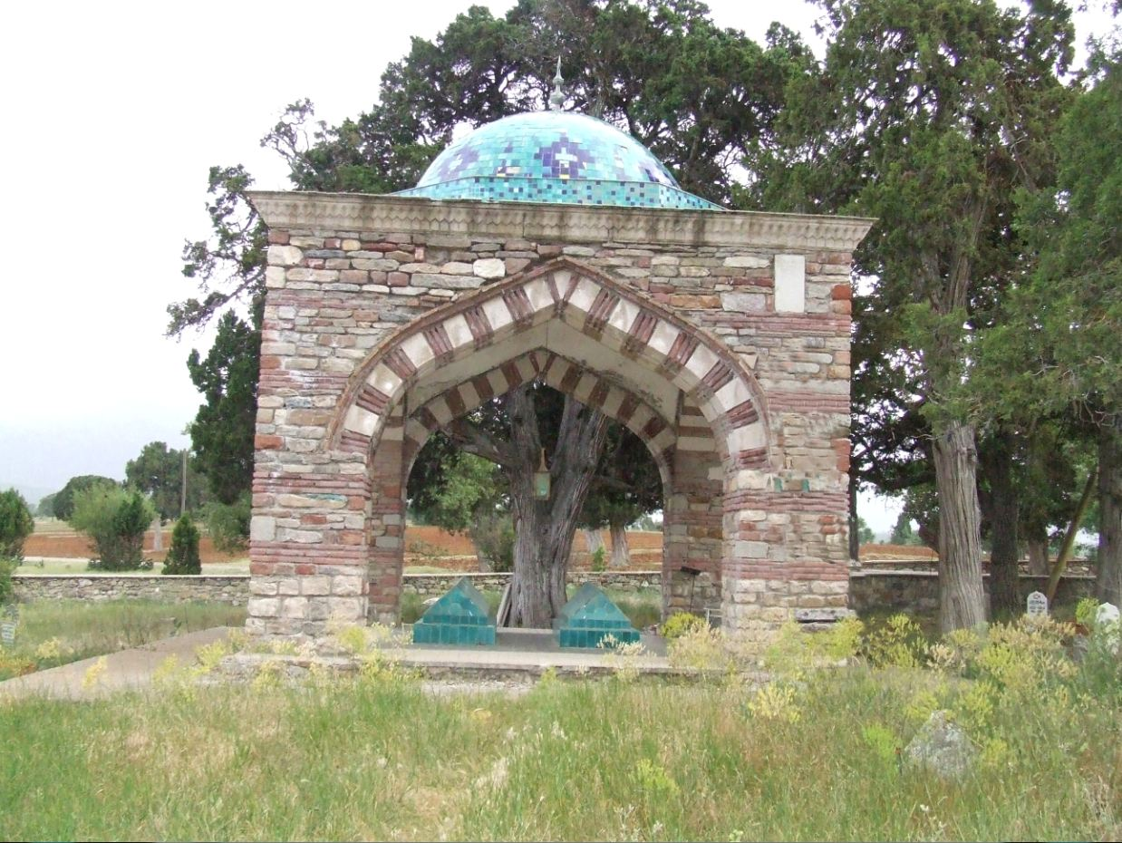 Anasultan, Kütahya